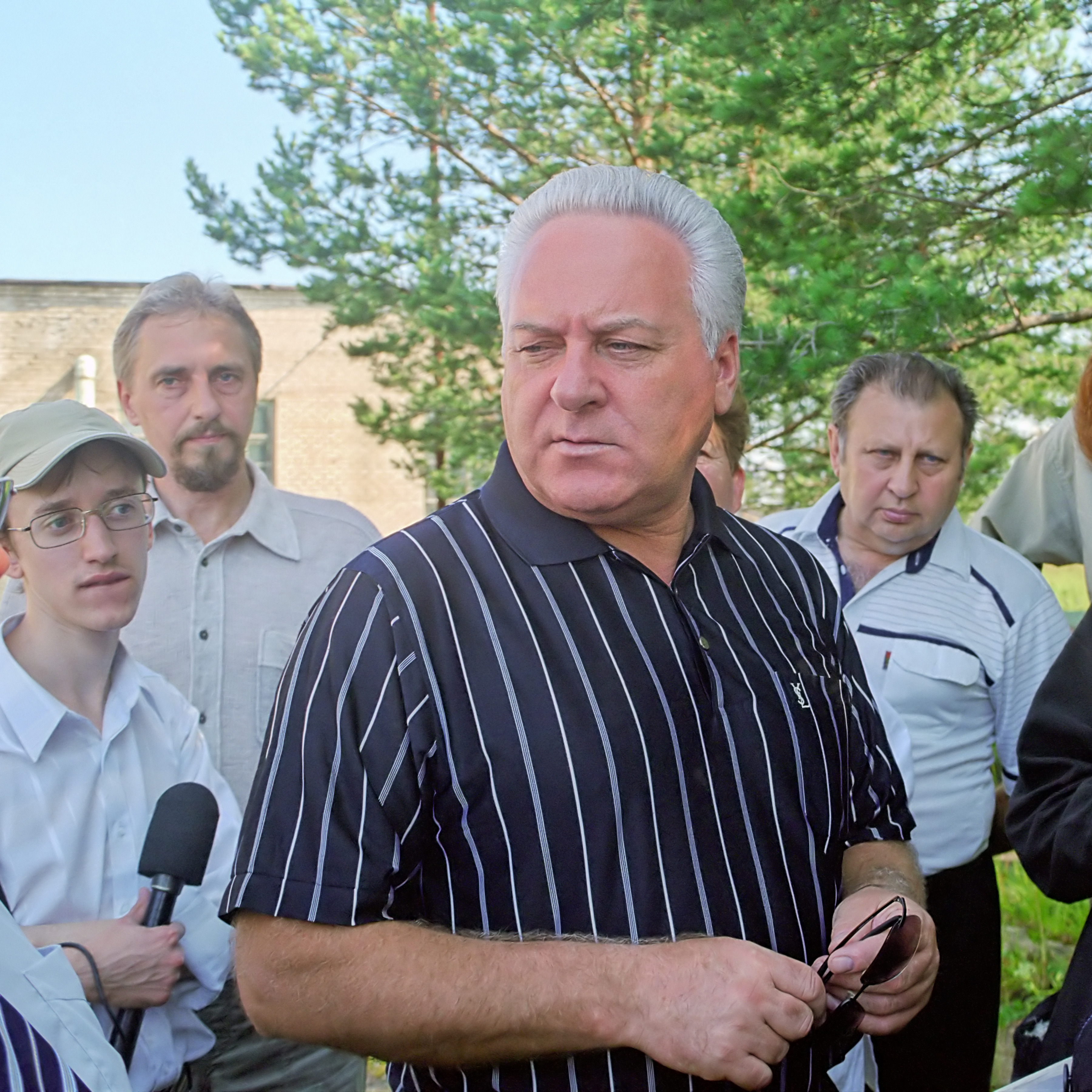 Анатолий Иванович Лисицын в конно-спортивном клубе «Святово». Слева направо: мужчина, Павел Анатольевич Морозов (президент конно-спортивного клуба «Святово»), Анатолий Иванович Лисицын (губернатор Ярославской области), мужчина. Село Святово, Переславский район.